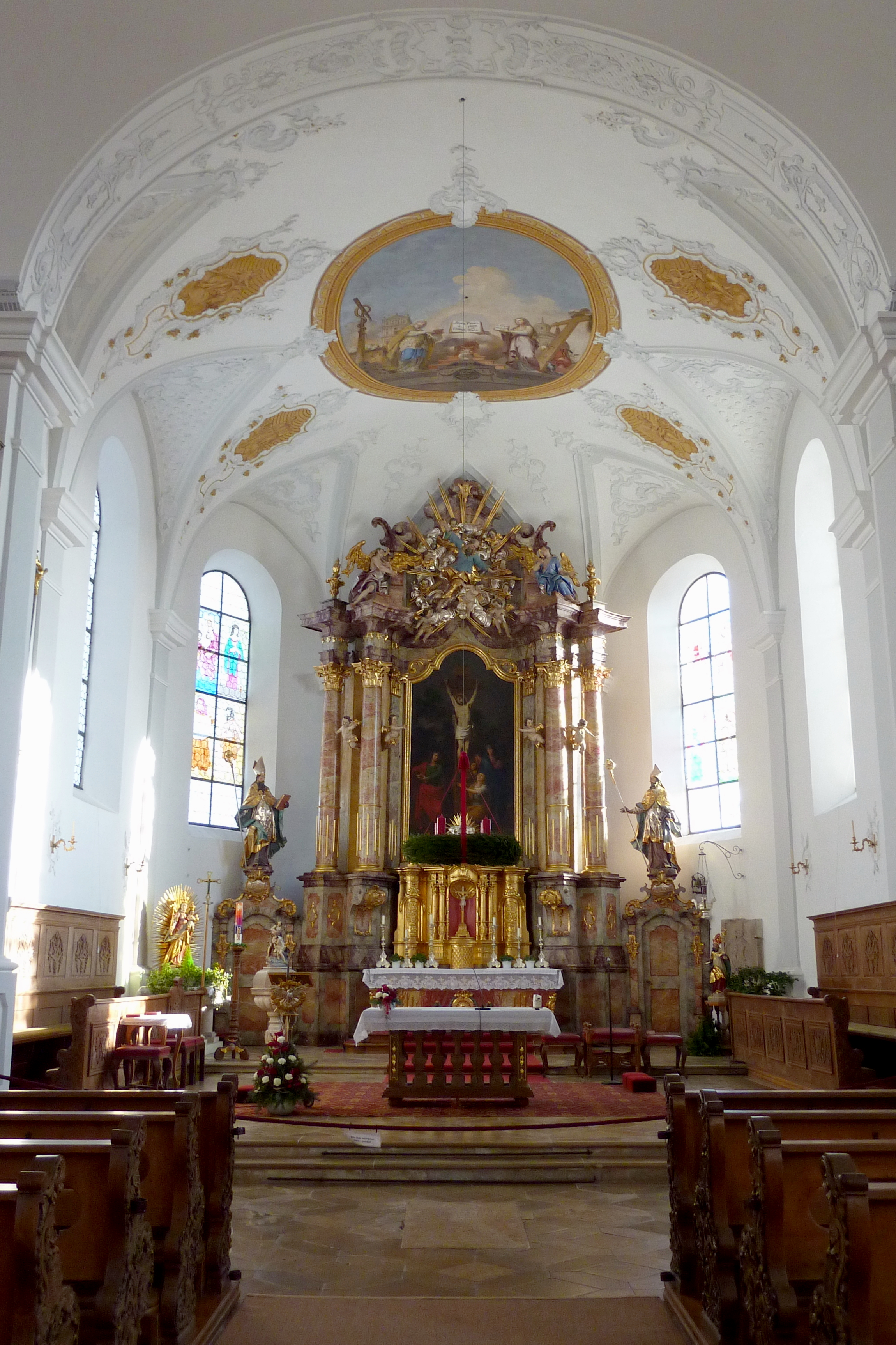 Katholische Pfarrkirche St. Ulrich und Martin in Wittislingen im Landkreis Dillingen an der Donau, Innenraum